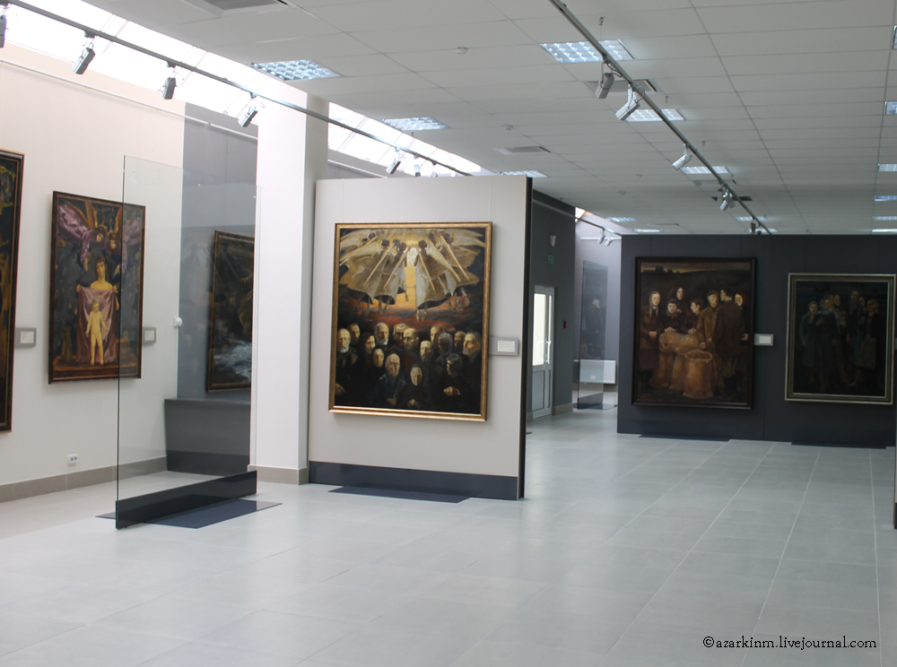 Новы будынак. Мастацкая галерэя Міхаіла Савіцкага